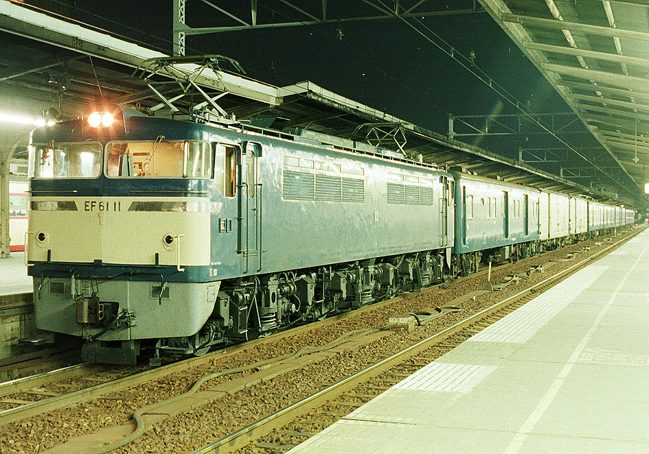 国鉄EF61 11けん引荷物列車